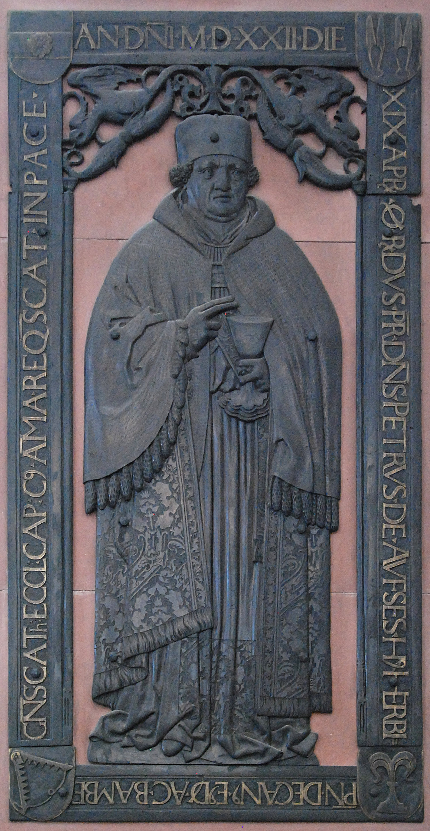 Peter von Aufseß († 1522) Bronzeplatte